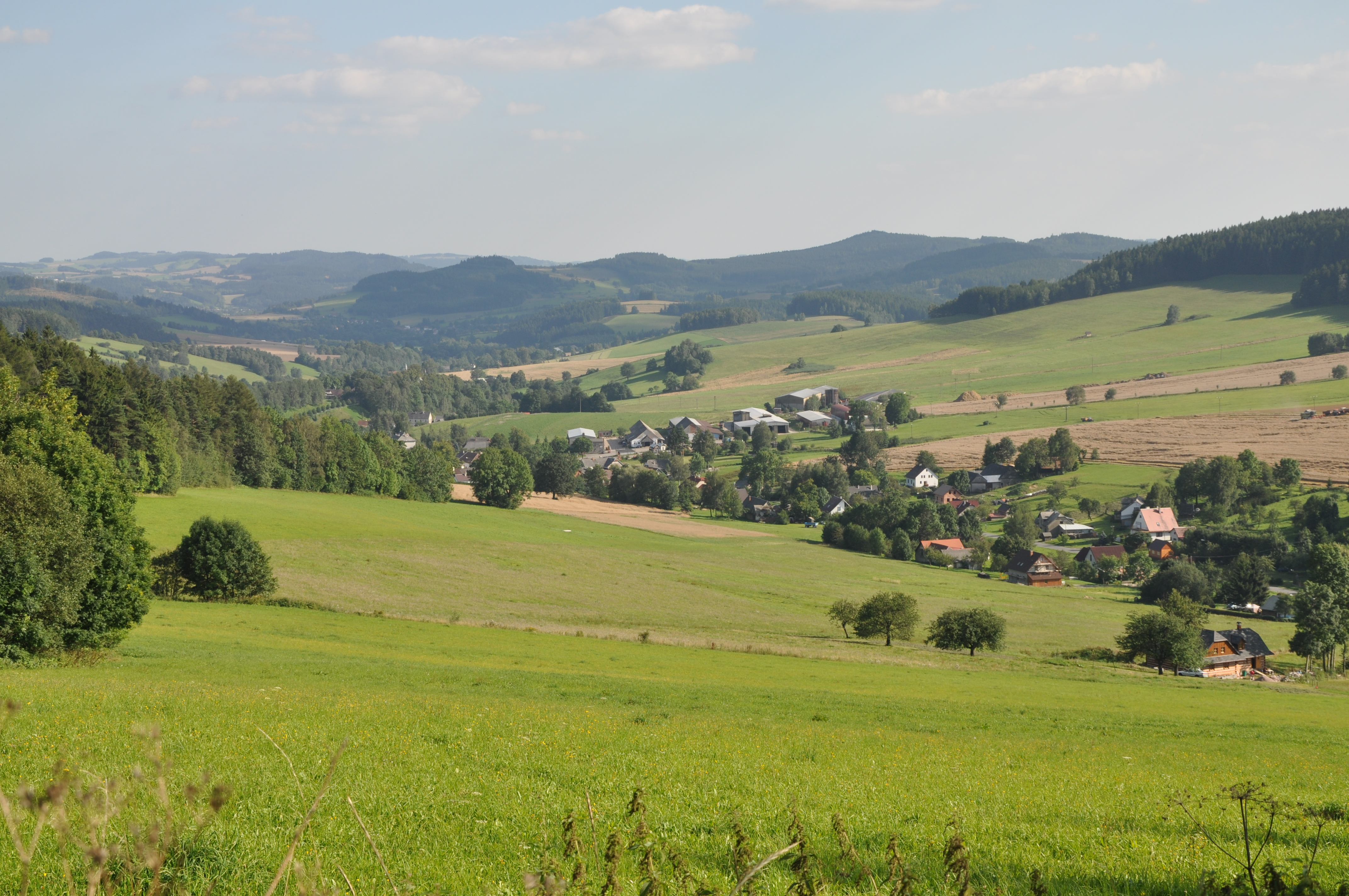 Telecí od Luckého vrchu